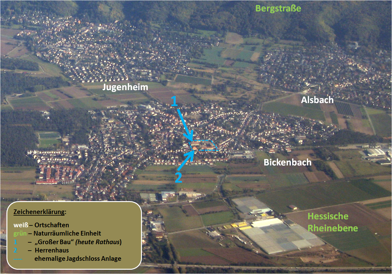 Lage des ehemaligen Jagdschlosses Bickenbach, Blick von Westen Richtung Bergstraße Template file: File:Seeheim-jugenheim und bickenbach.jpg, partly used with description